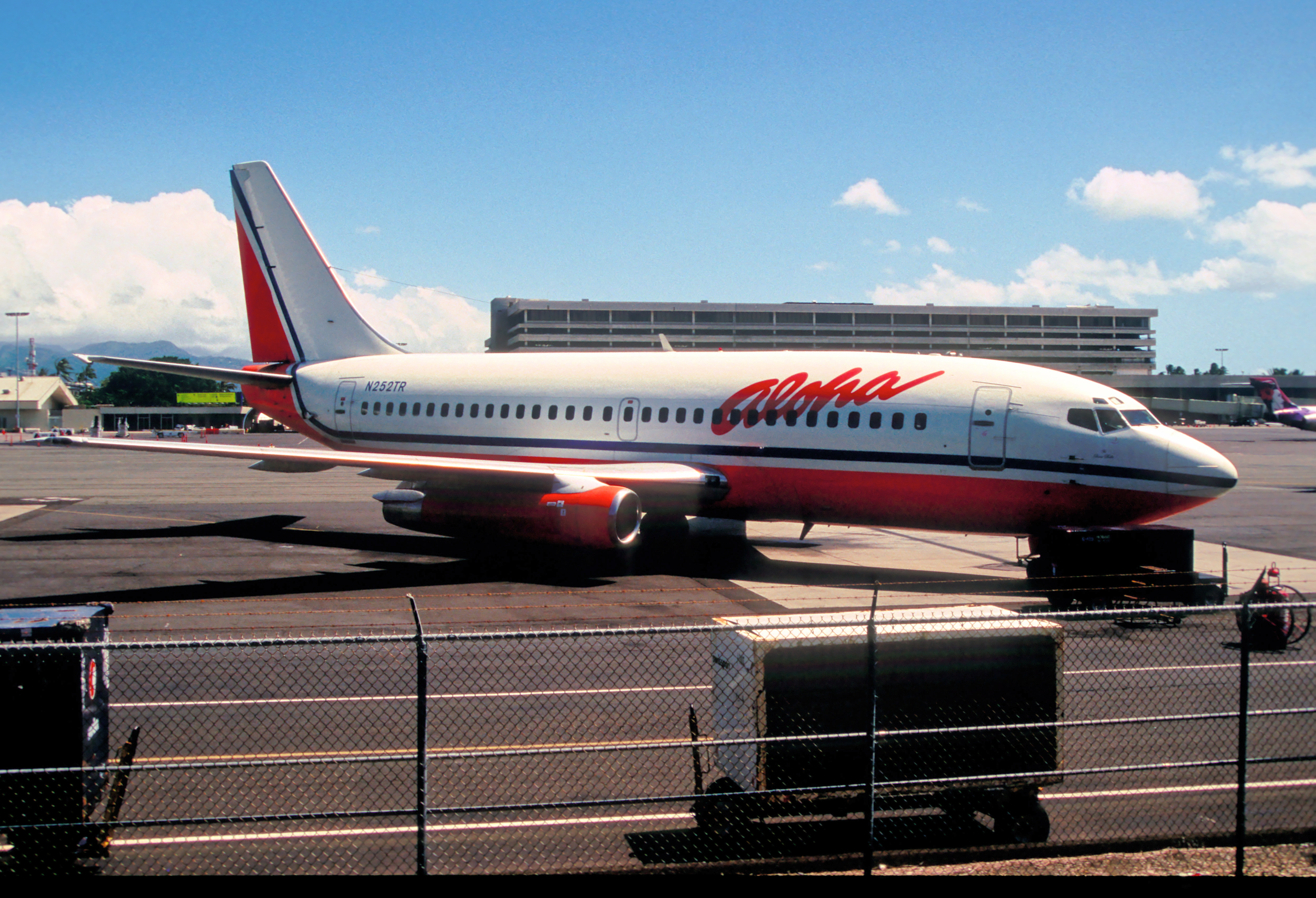 424ab - Aloha Airlines Boeing 737-228; N252TR@HNL;30.09.2006